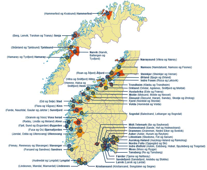 Norges kommunekart etter kommunereformen 01.01.2020